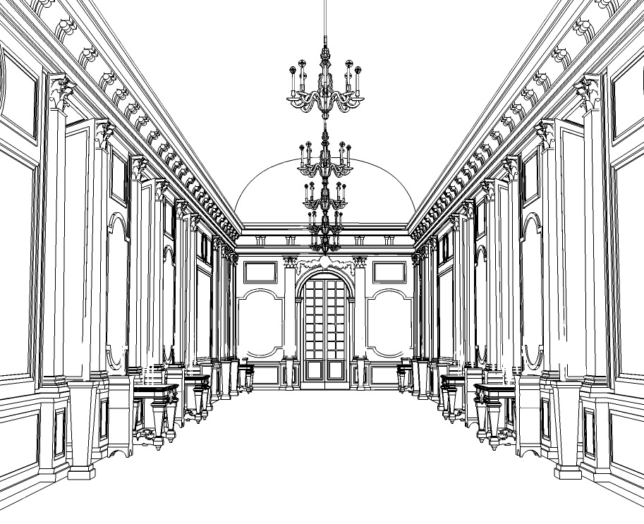 Schéma de la galerie du Château-Vieux de Meudon.